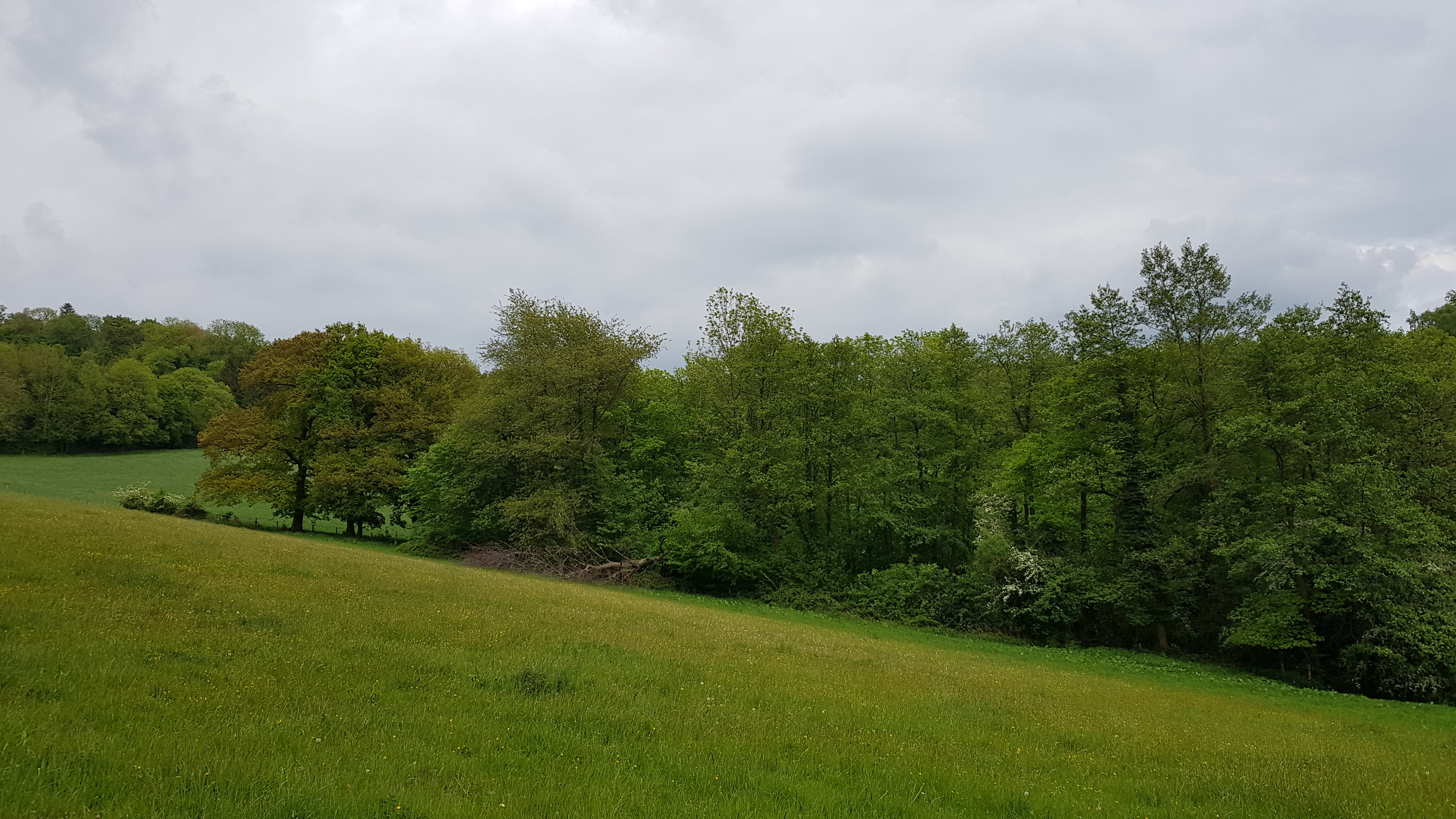 dal van de Cottesserbeek bij Sippenaeken, prikkeldraad vorm grens tussen België (achter de bomen) en Nederland (voorgrond)